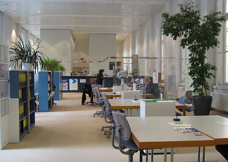 Blick in das Informationszentrum Patente in Stuttgart